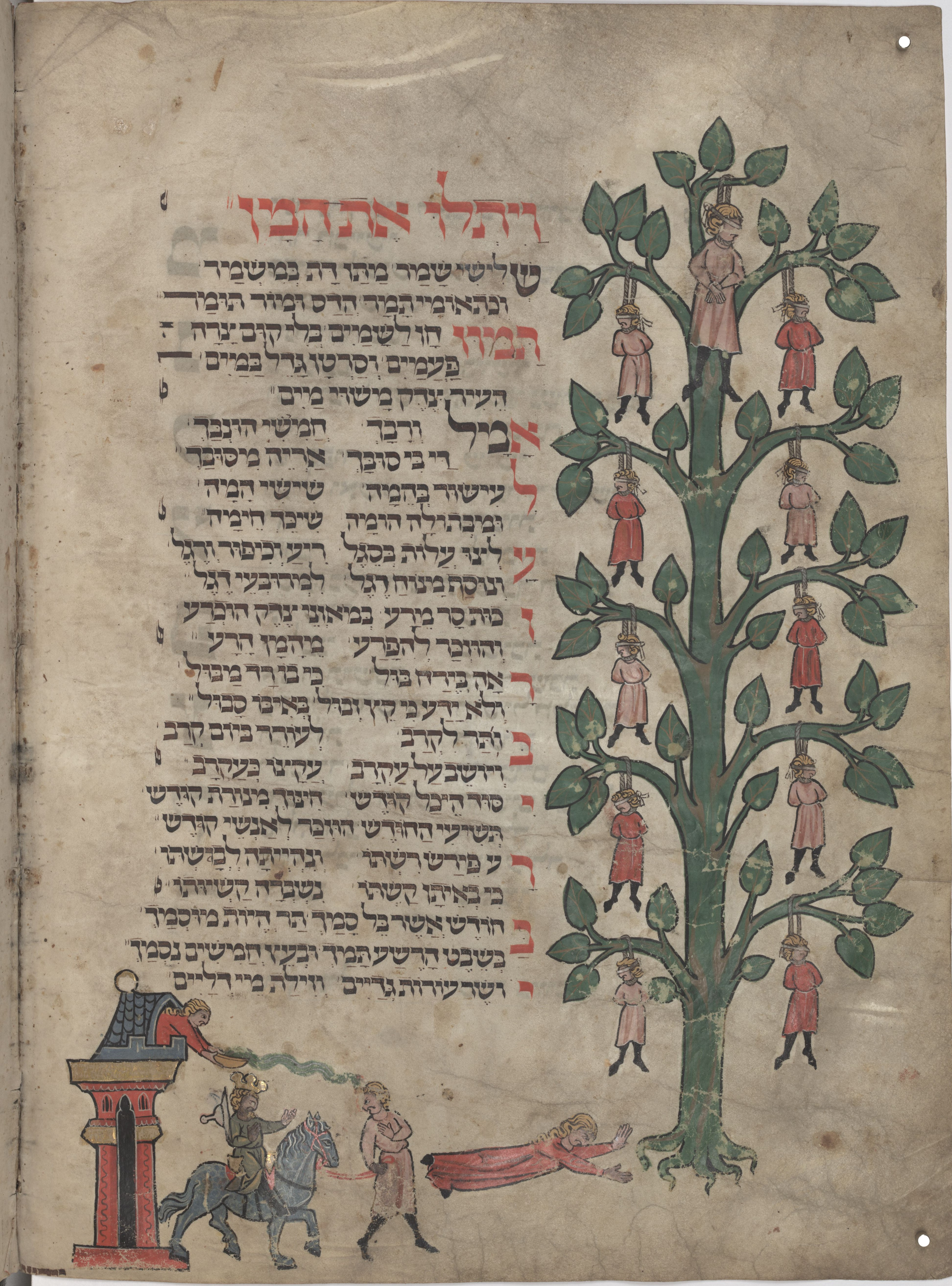 קטעים מפיוטי ההרחבה לפורים "אספרה אל חוק" ו"אמל ורבך", מתוך הקרובה לפורים 'ויאהב אומן' לרבי אלעזר ברבי קליר. מודגשות המילים "ויתלו את המן", ומצוייר המן תלוי על העץ עם עשרת בניו. כן מצויירת הולכת מרדכי על העץ. מתוך מחזור ליפסיא (לייפציג Ms. 1102) עמוד 51ב